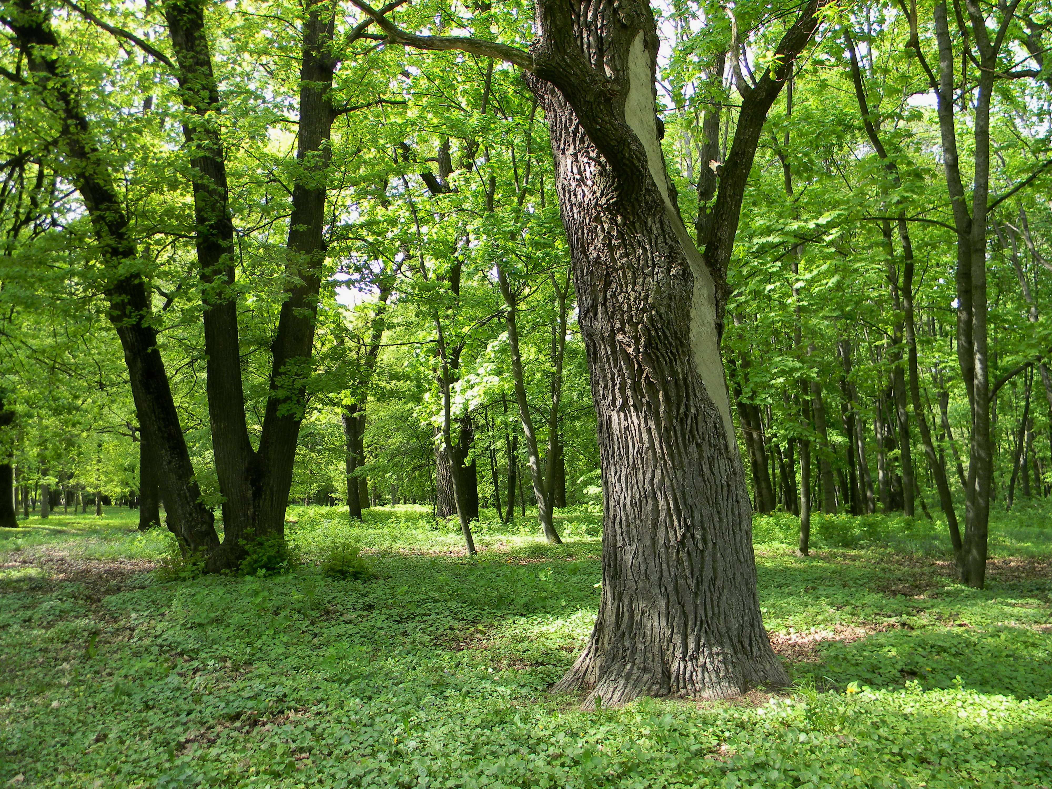 Кочубеївський, Бахмацький район, смт. Батурин